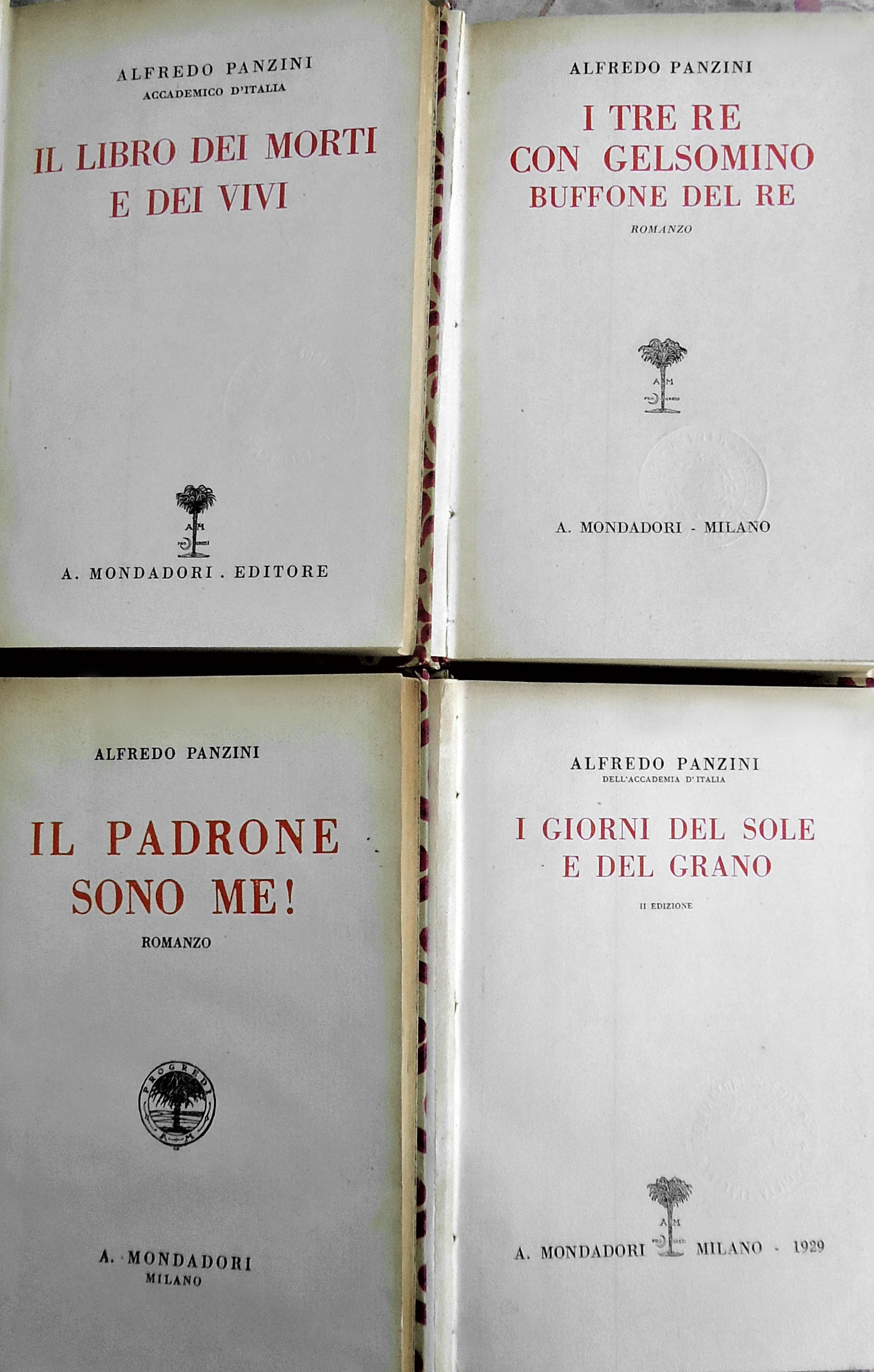 Alfredo Panzini, Il libro dei morti e dei vivi ed. 1932, I tre re con Gelsomino buffone del re, ed. 1926, Il padrone sono me!, ed. 1925, I giorni del sole e del grano ed. 1929.